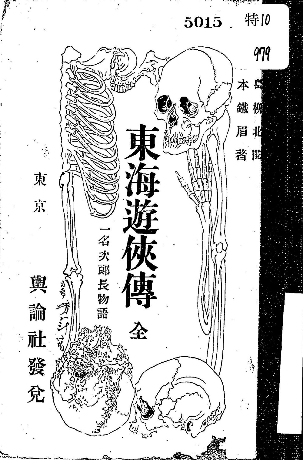 『東海遊侠伝』（1884年）、表紙。